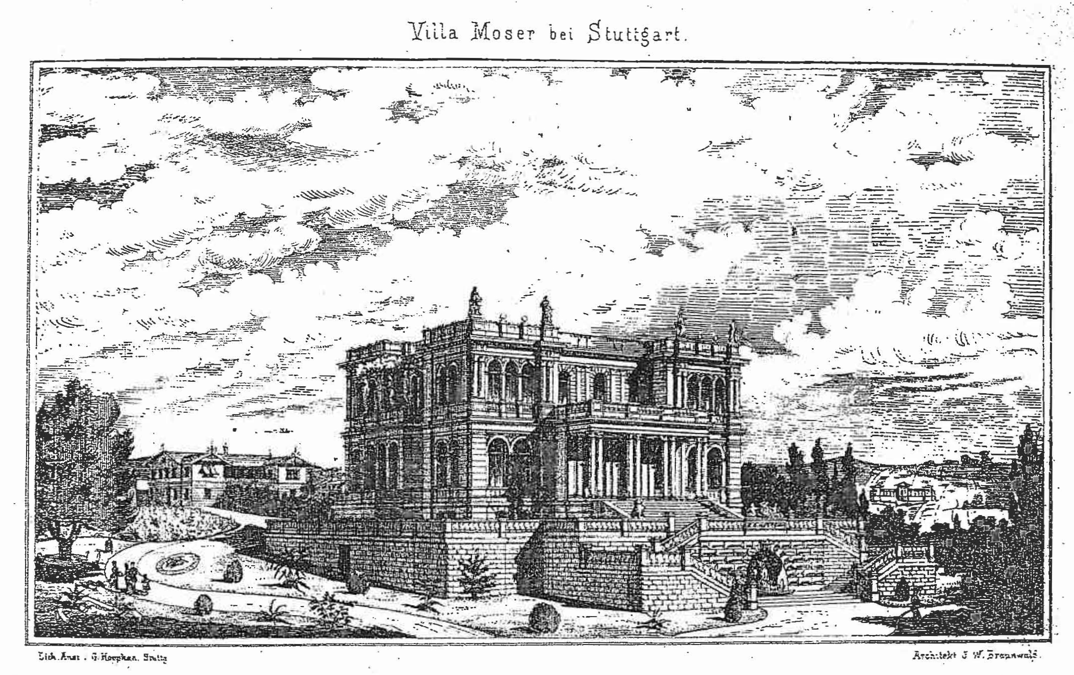 Ehemalige Villa Moser, Stuttgart, Leibfriedscher Garten, Entwurf, Ansicht von Osten, vor 1870. Architekt: Johann Wendelin Braunwald, Baujahr: 1872-1873, Bauherr: Eduard Otto Moser (1818–1879).